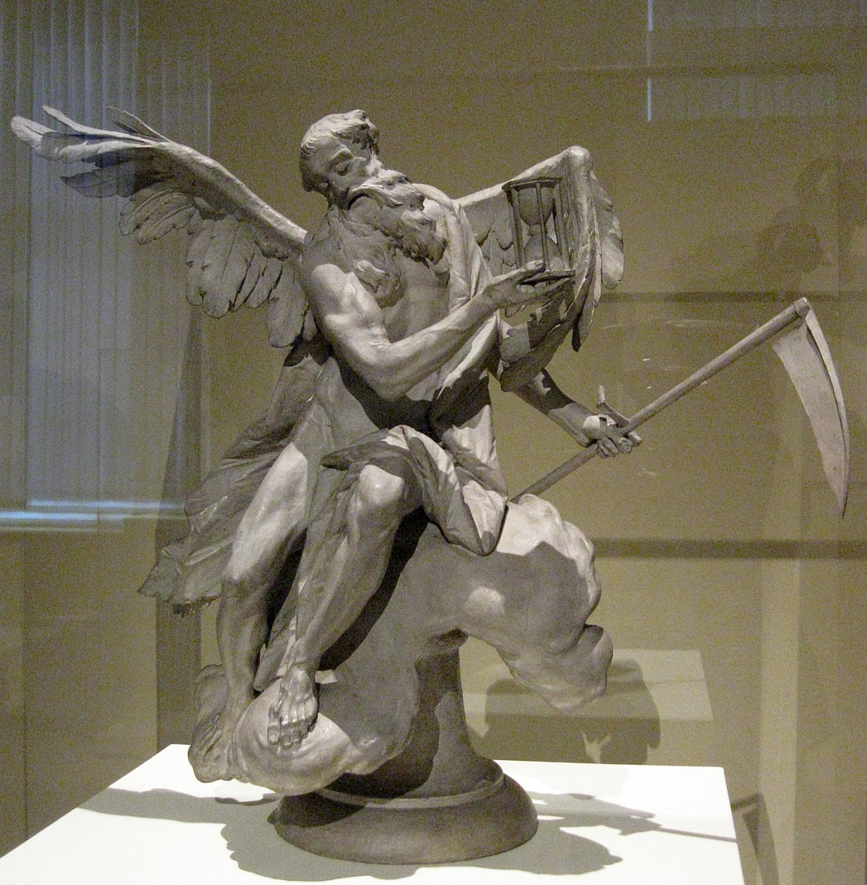 Ignaz Günther: Chronos, um 1765-75, Lindenholz weiß gefasst, Bayerisches Nationalmuseum in München